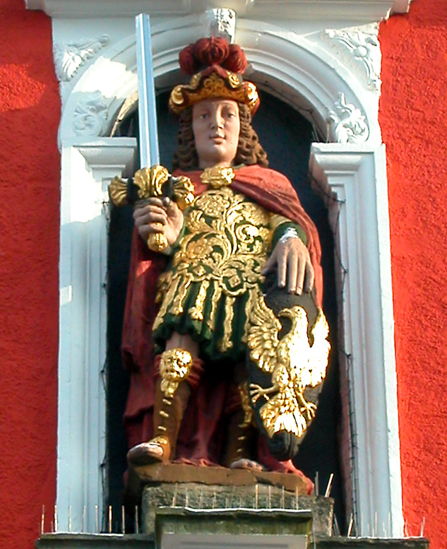 Hl. Patroclus von Troyes, Soest Rathaus, NRW, Deutschland